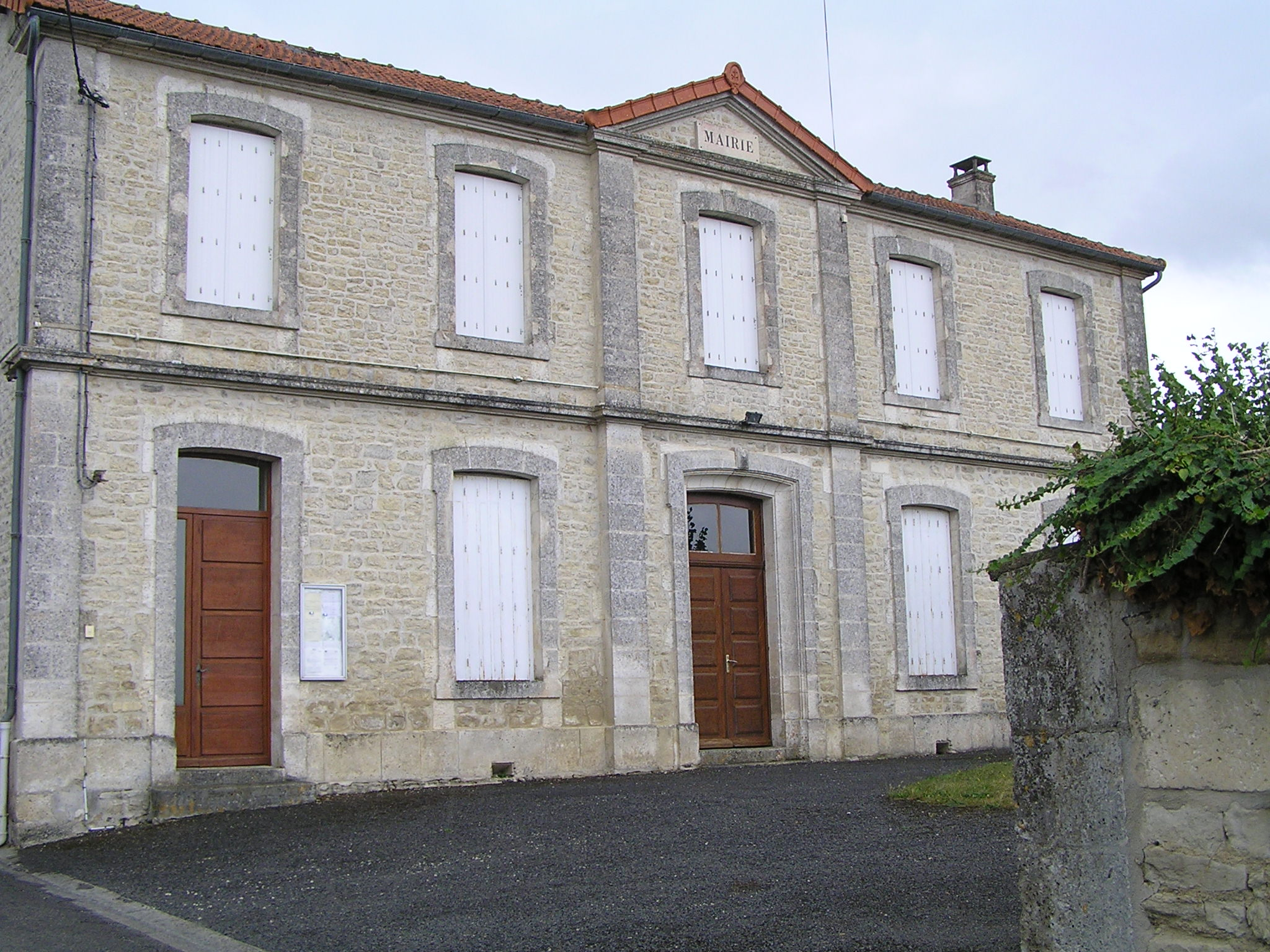 mairie de Coulonges